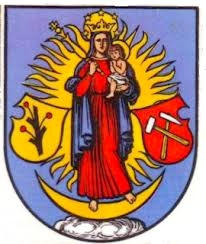 Znak obce Měděnec v okrese Chomutov